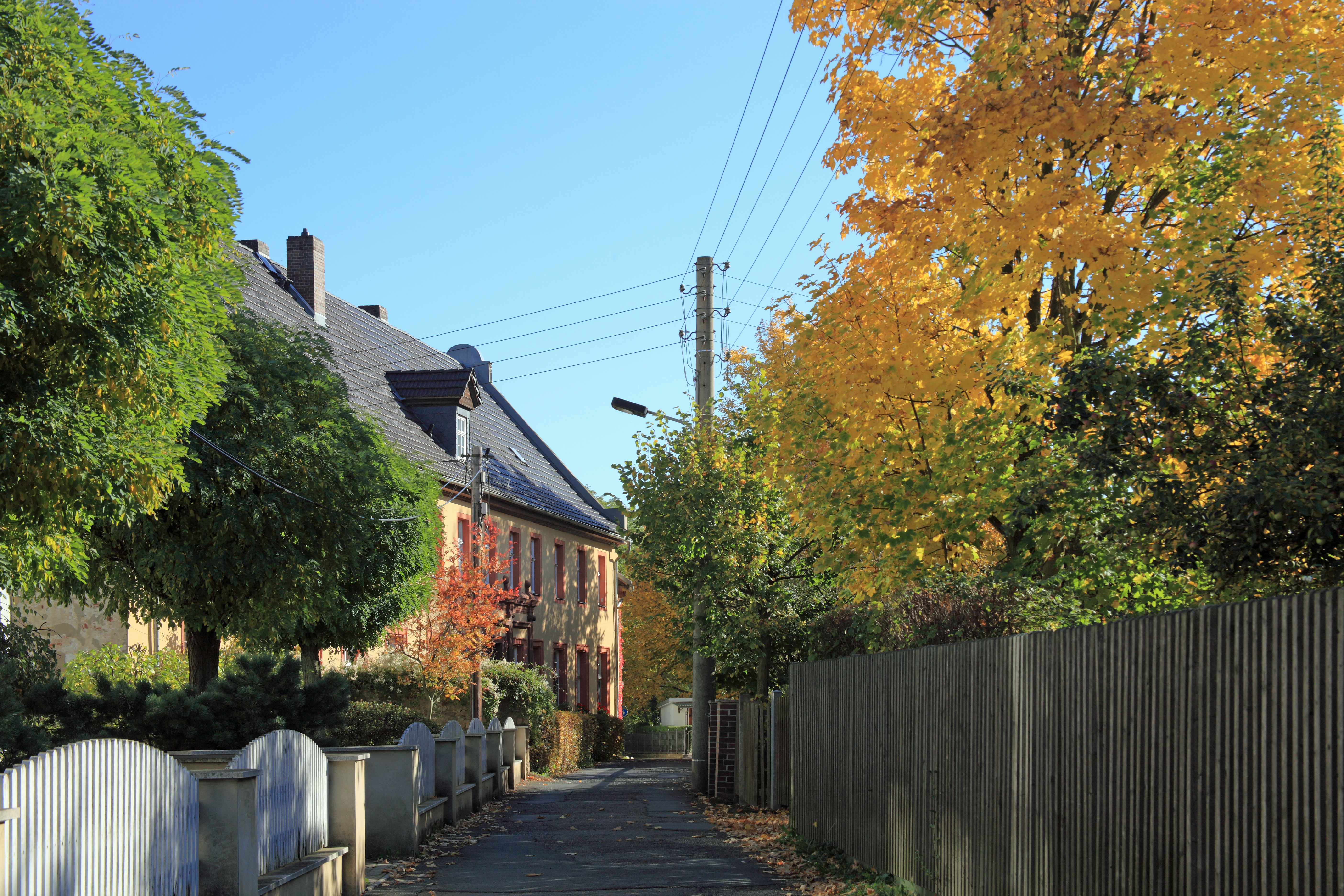 Am Vorwerk